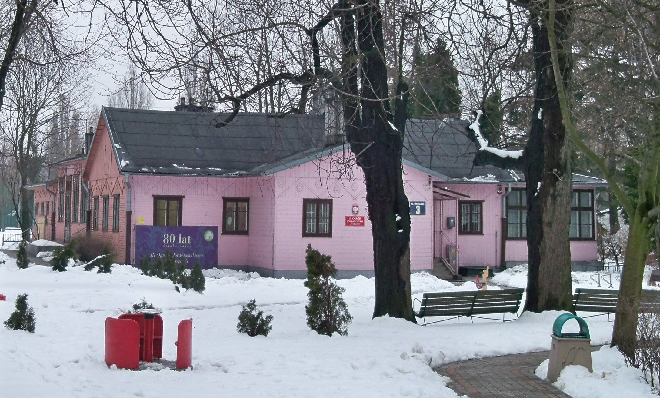 III Ogród Jordanowski w Warszawie, ul. Wawelska 3, róg Ondraszka – północna część Pola Mokotowskiego